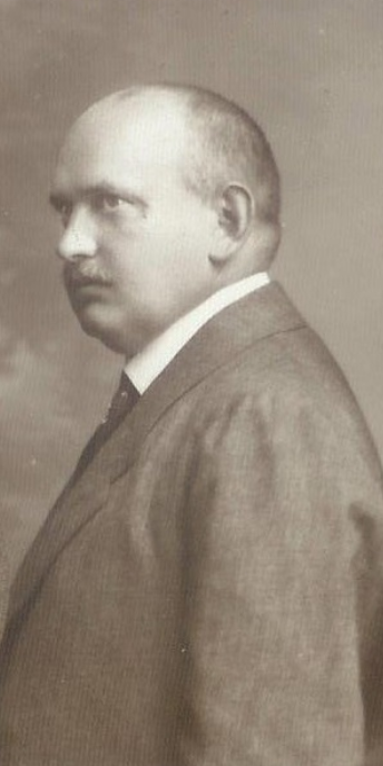 Fangler Gyula (1881–1945), zalaegerszegi fűszer kereskedő, a Zalaegerszegi Kereskedelmi Kör elnöke, a Zalamegyei Kereskedők Kör tagja, a zalaegerszegi katholikus hitközség képviselőtestületének és a Katolikus Férfiliga tanácsának